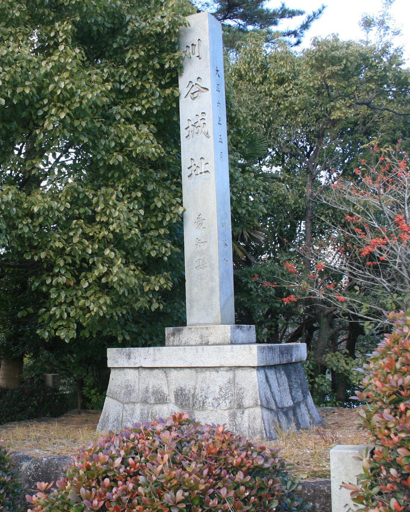 Site of Kariya Castle, Kariya, Aichi